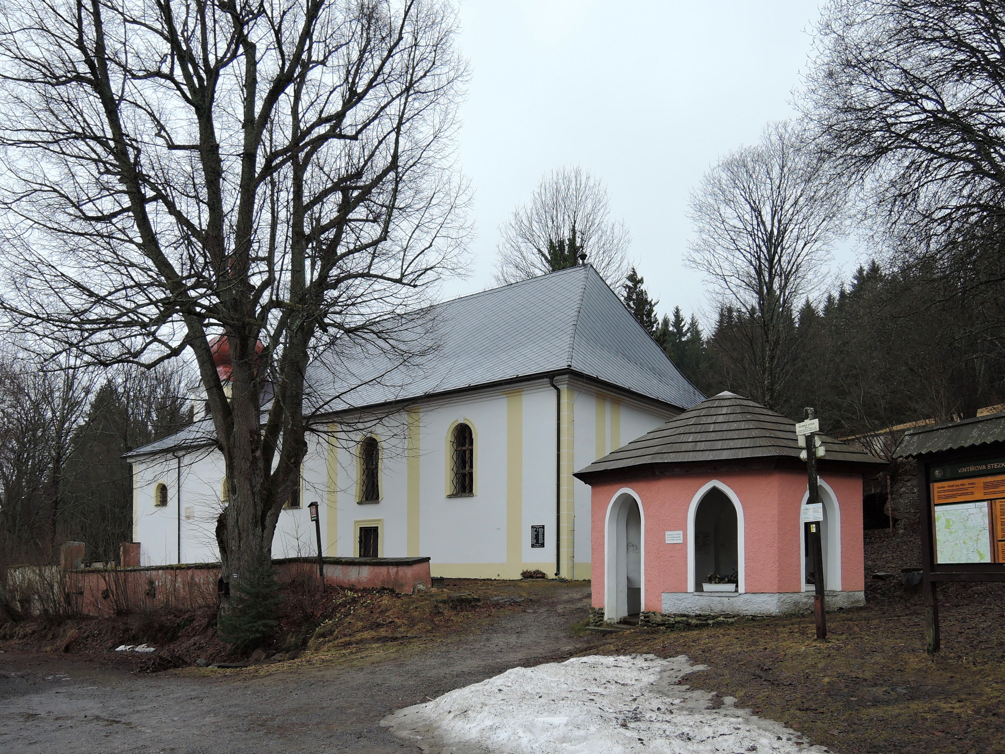 Hartmanice, část Dobrá Voda, pramen a kostel sv. Vintíře